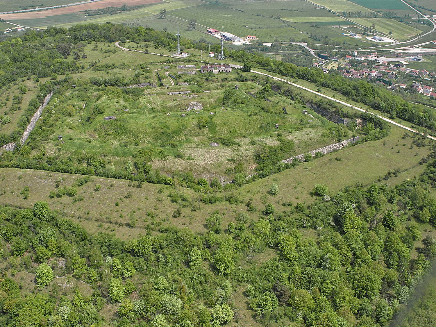 Vue aérienne fort de Domgermain.